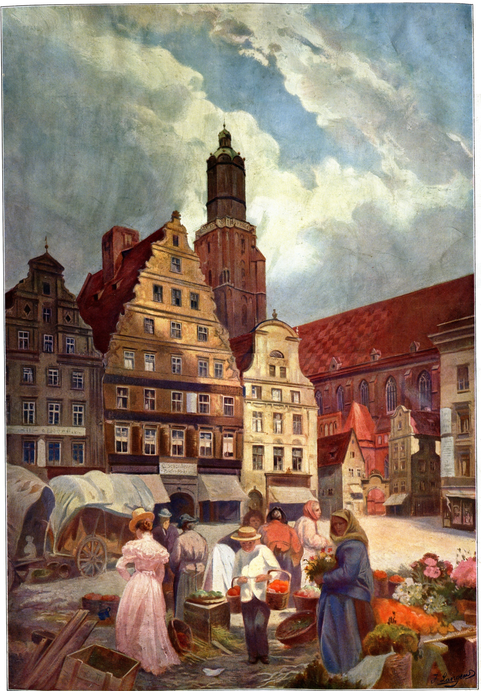 Breslau: "Ring mit Elisabethkirche"